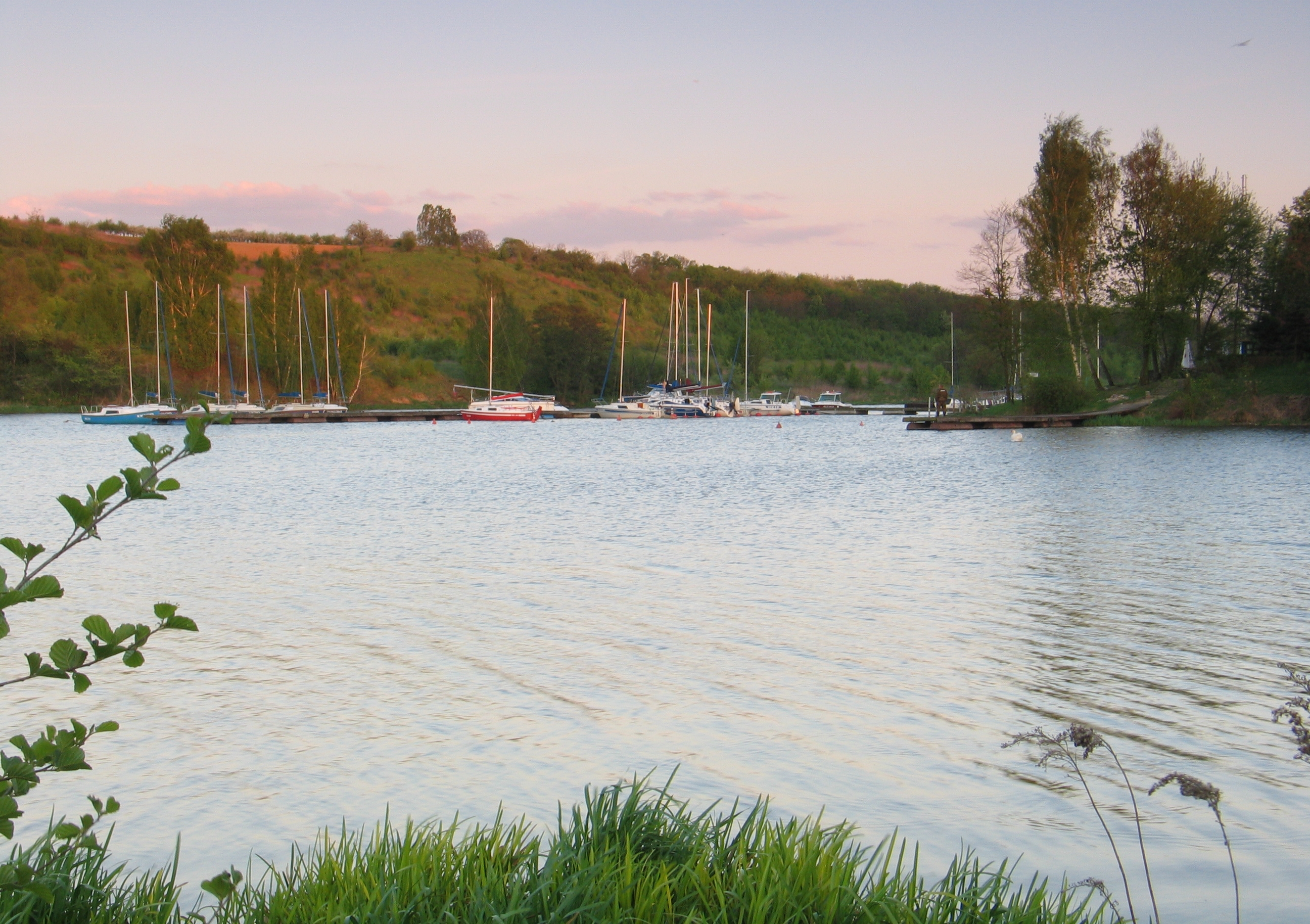 Zatoka Zarzeczewo w kwietniu